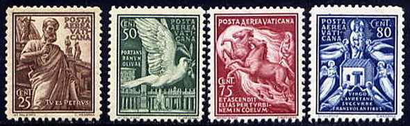 Первые авиапочтовые марки Ватикана, 1938